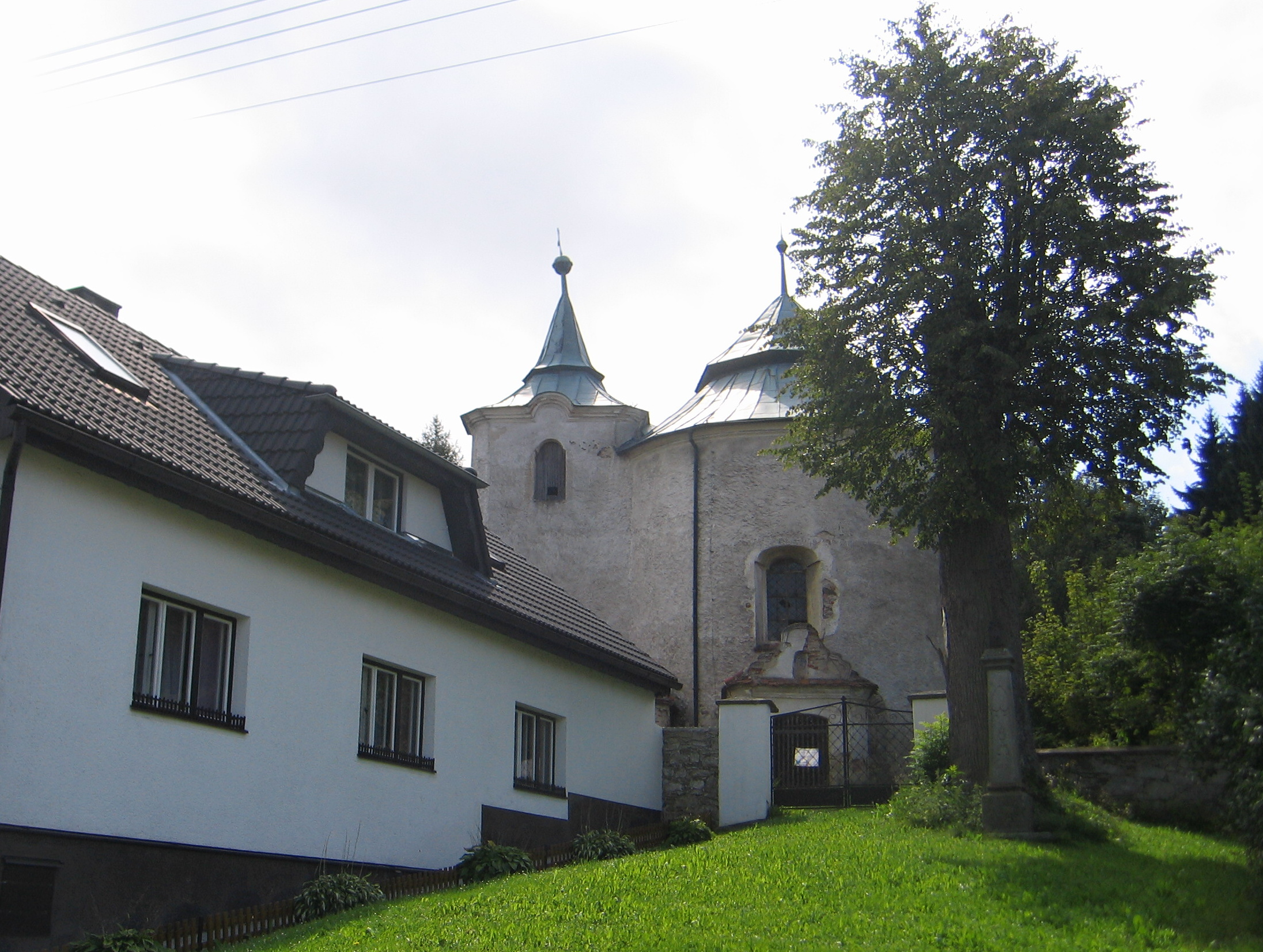 Kostel sv. Jana Křtitele (Zborovy), návrší, Zborovy